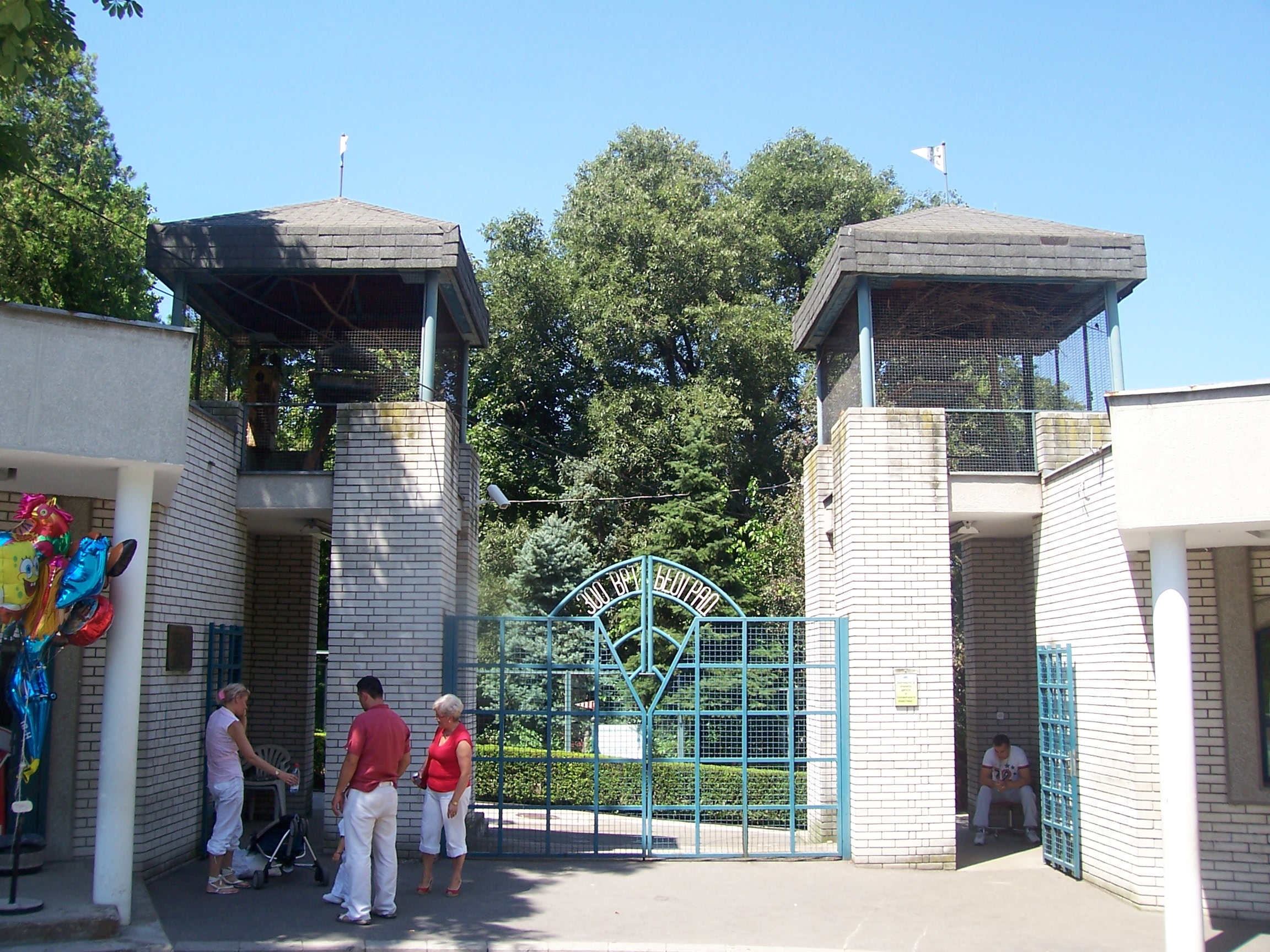 Главный вход в Белградский зоопарк